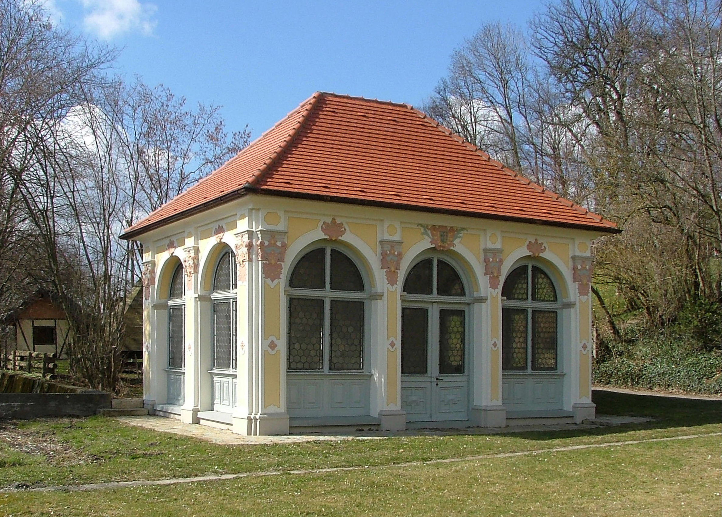 Pavillon